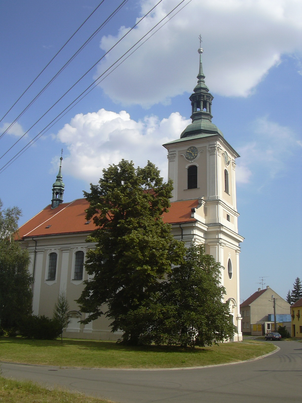 Barokní kostel Dědice 01(Vyškov- czech republic)